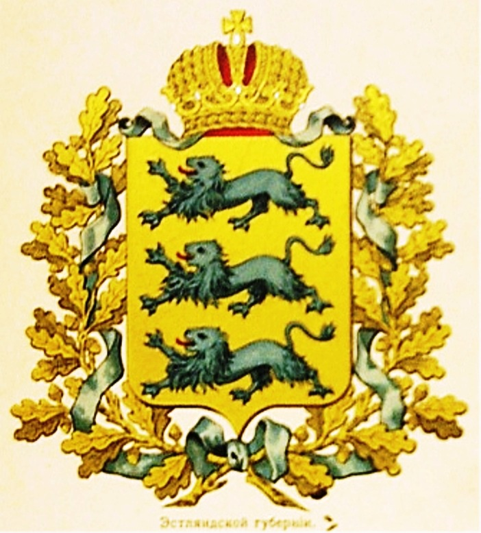 Russian Empire coat of arms Estlandia Governorate. Paper non-post card of Russian Empire. Герб Российской Империи Эстляндской губернии издания Сукачова, СПб. Непочтовая карточка Российской Империи.